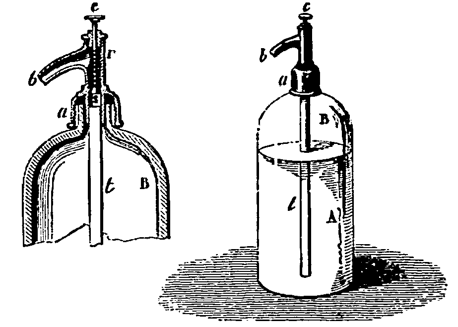 Détail (Figure 37) de la page 53 des Leçons élémentaires de chimie (1897), de Bussard et Dubois - Flacon d'eau de Seltz. — t, tube par lequel monte le liquide A sous la pression du gaz carbonique B ; s, soupape conique qui ferme le tube t et qu'on abaisse au moyen du bouton c ; r, ressort agissant de bas en haut sur la soupape pour la faire remonter